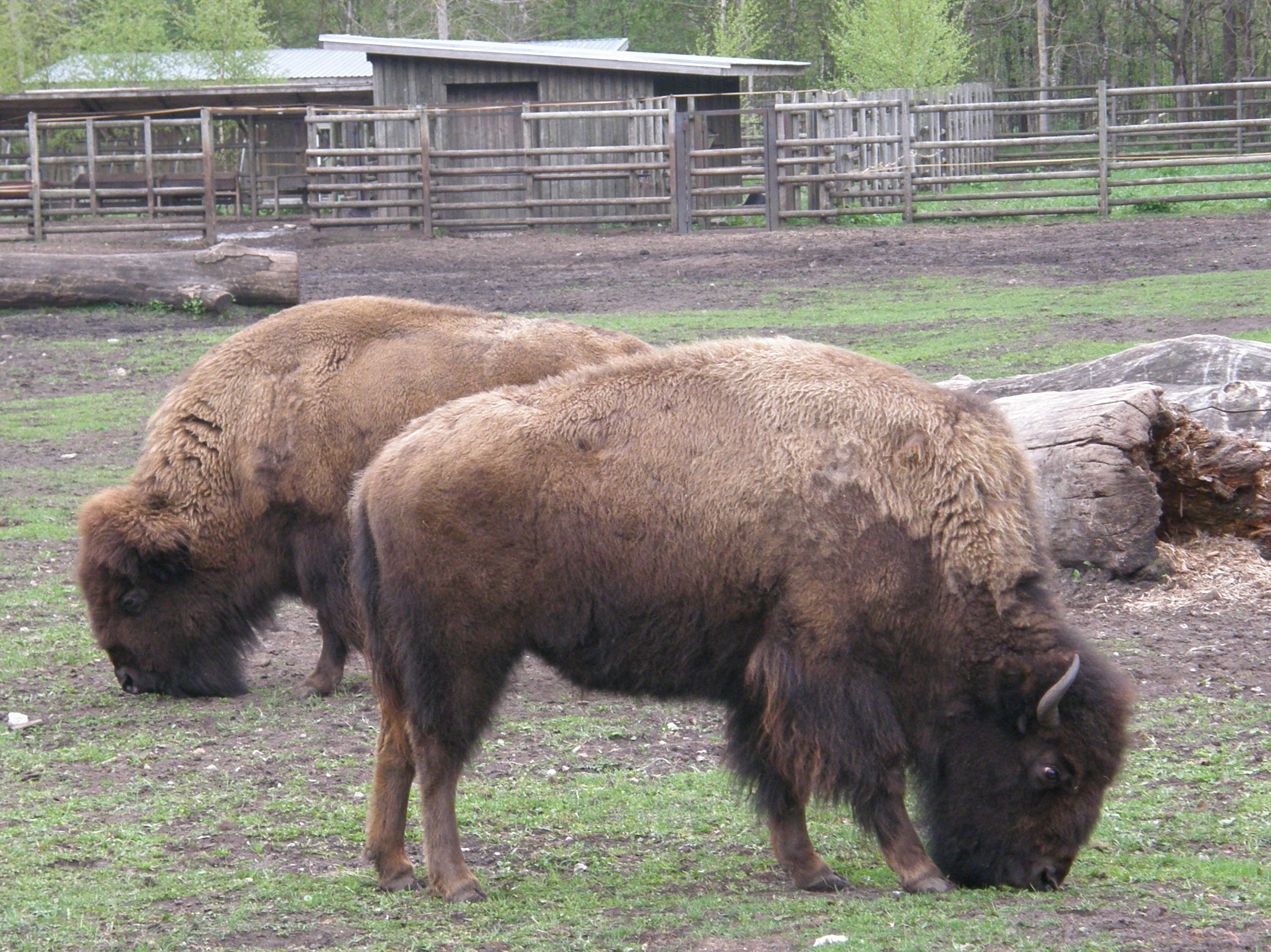 Euroopa piisonid Tallinna loomaaias